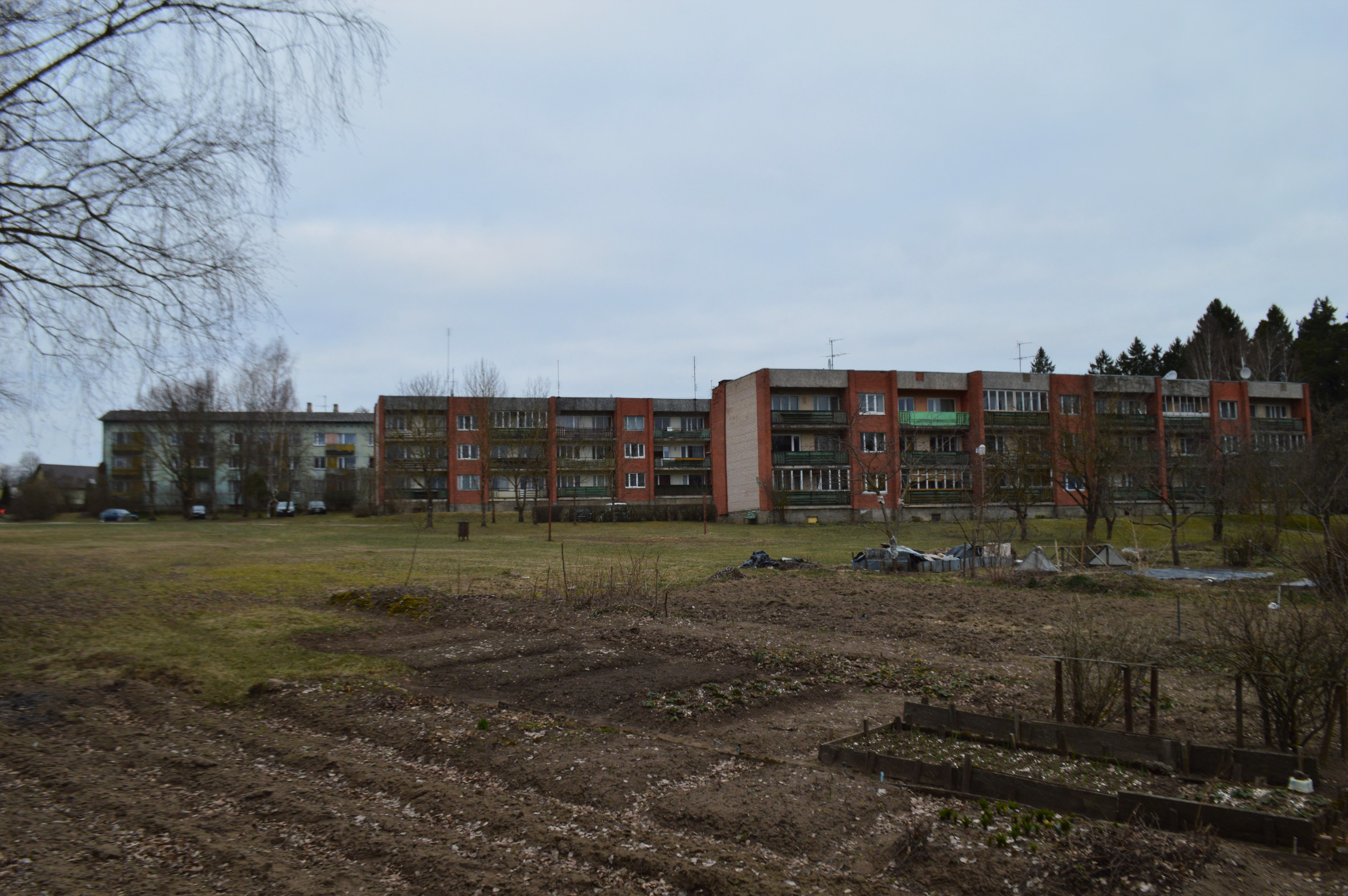 Latgaļu: Vīseitys mikrorajonu stateja PMK i agrofirmys "Daugava" struodnīkim.